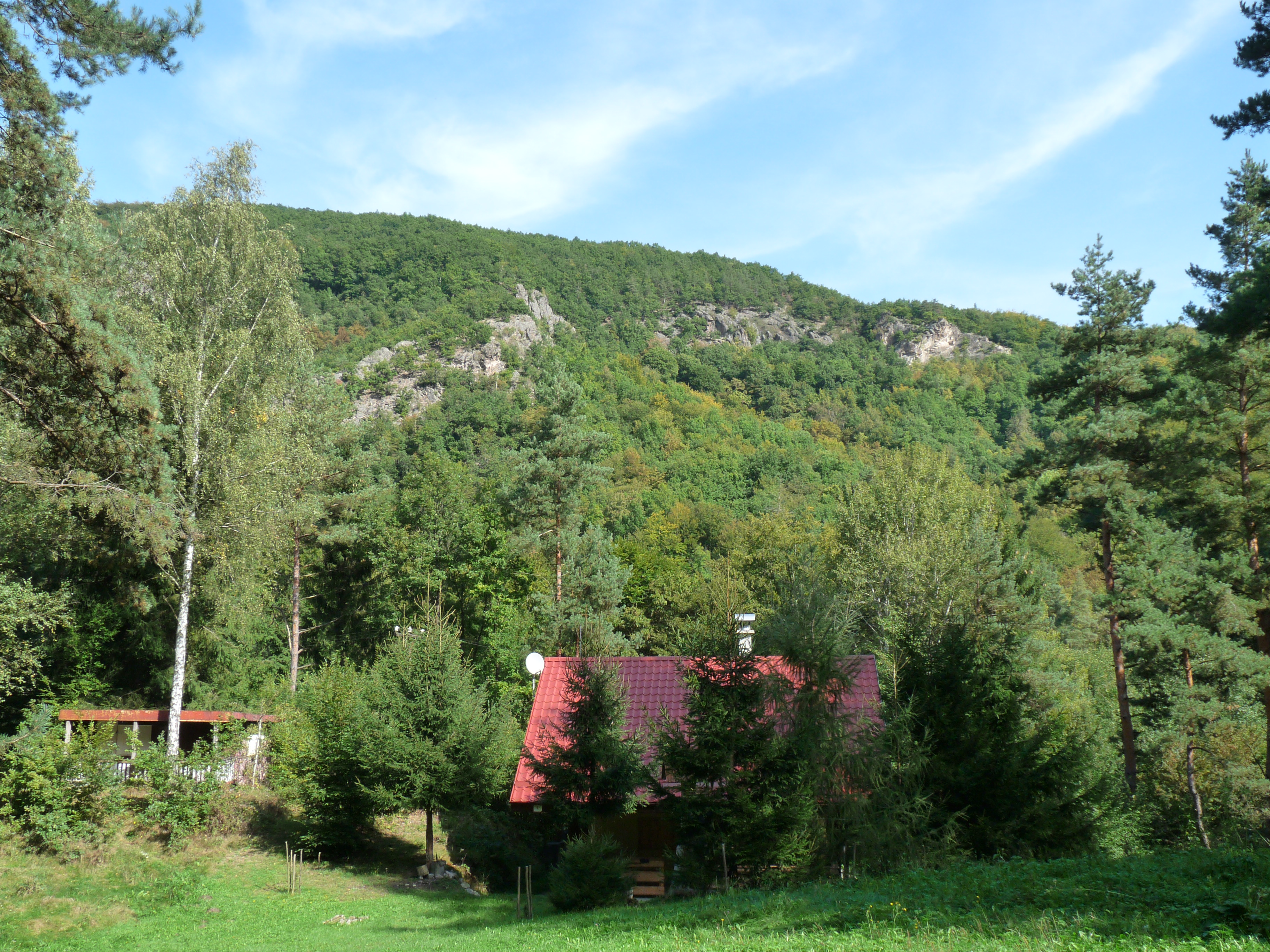 Pod Kapitulskými bralami